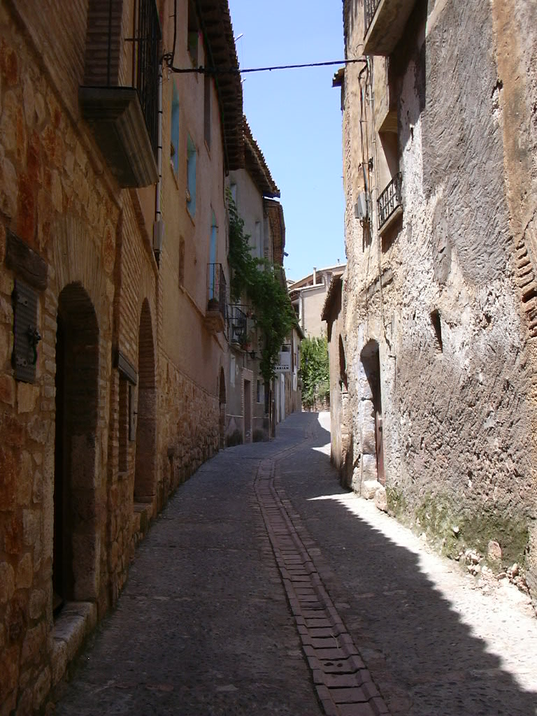 Calle de Alquézar